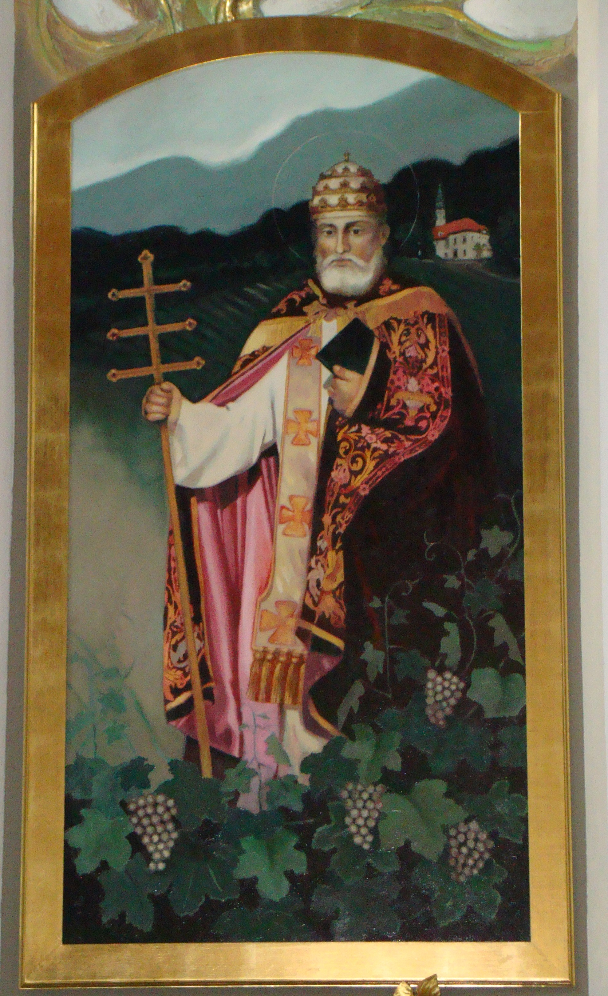 Obraz św. Urbana I w kościele pod jego wezwaniem w Zielonej Górze